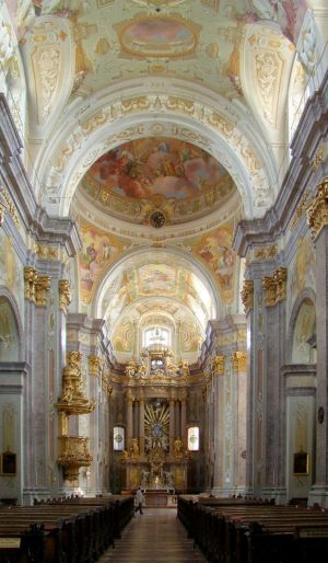 Innenansicht auf den Hochaltar der Basilika Sonntagberg, Bezirk Amstetten Photographiert von Dr. Herwig Reidlinger April 2004